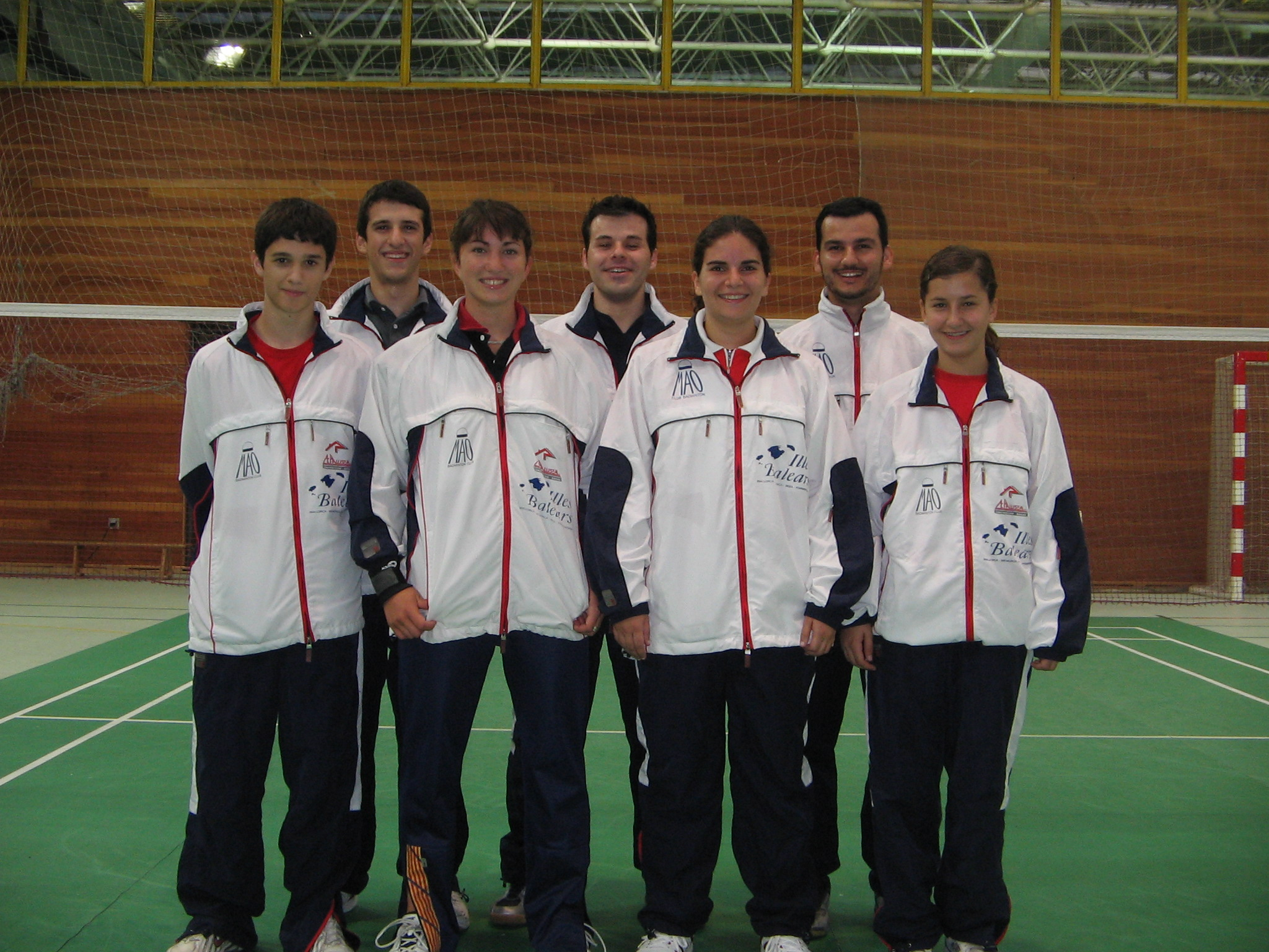 Plantilla Club Bádminton Mahón, ancomes